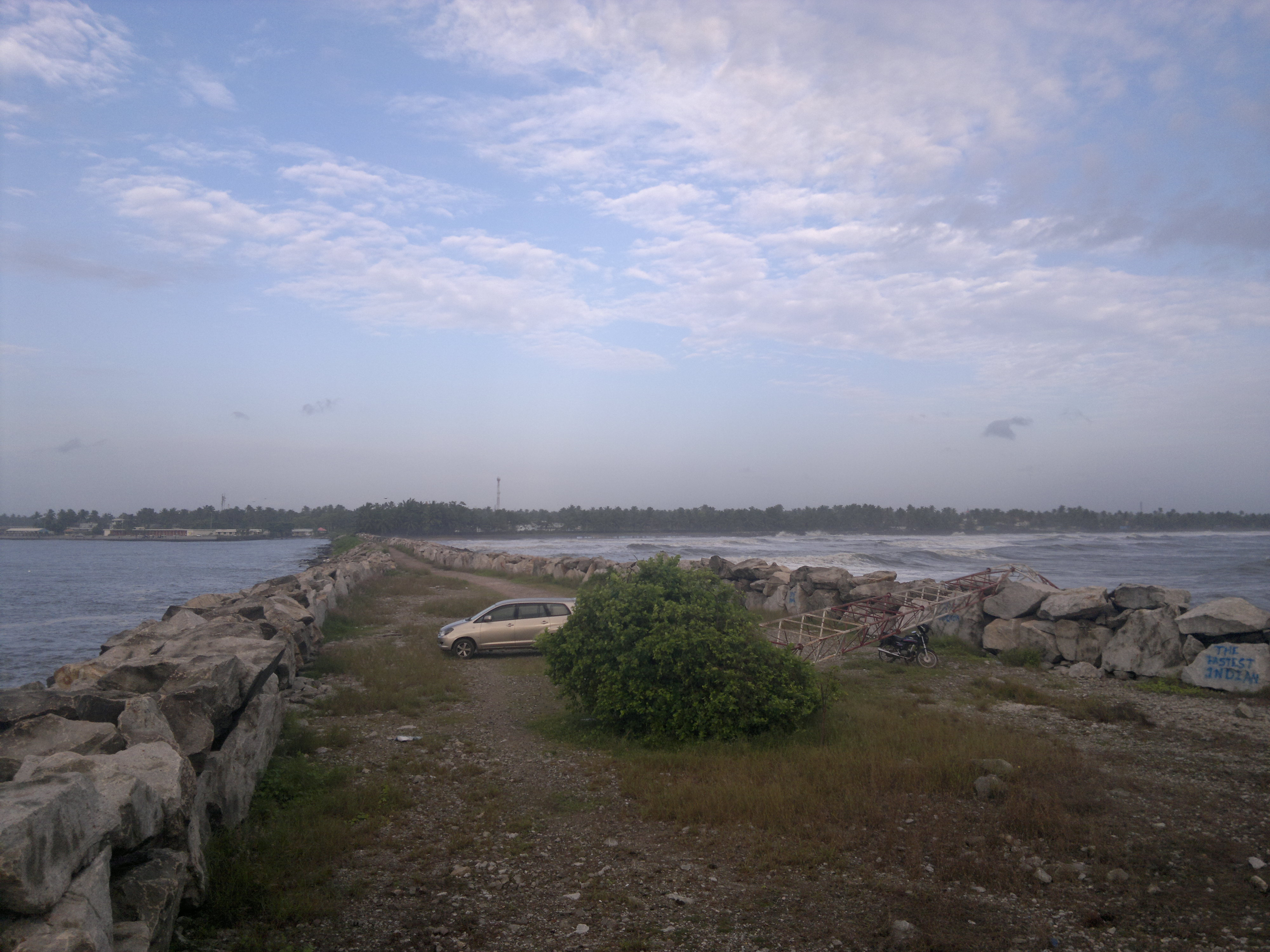 ശക്തികുളങ്ങരയിലെ പുലിമുട്ടിന്റെ ദൃശ്യം. നീണ്ടകര ഫിഷിംഗ് ഹാര്‍ബറിനെ സംരക്ഷിക്കുന്നതിനാണ് ഇത് നിര്‍മിക്കപ്പെട്ടത്.